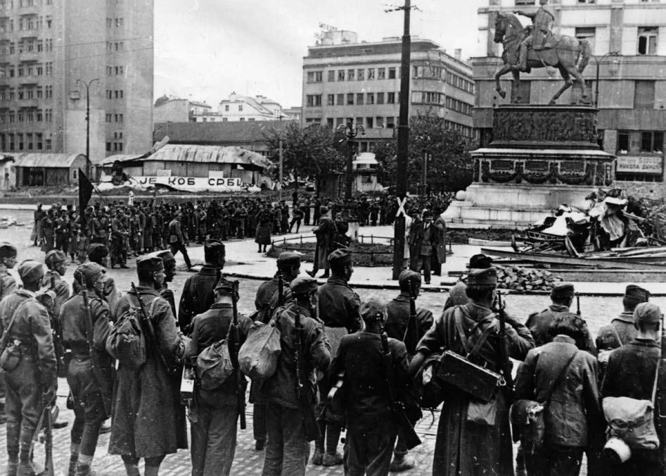 Srpskohrvatski / српскохрватски: Smotra na Trgu Republike, 20. oktobar 1944.